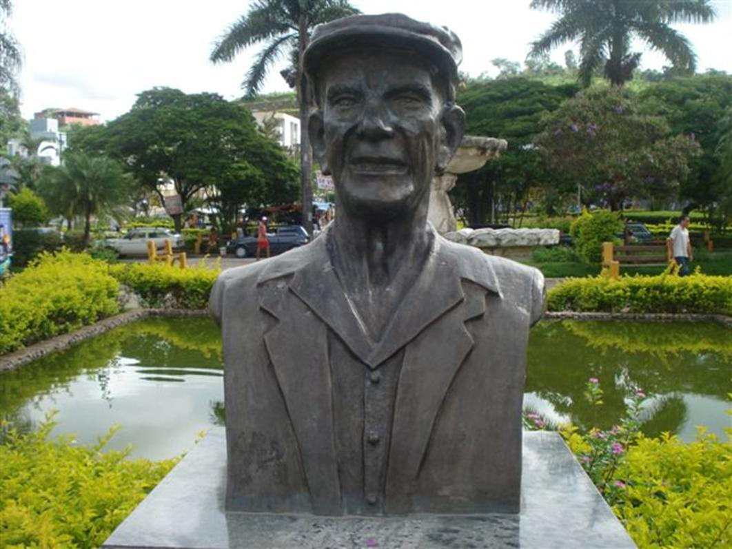 Photo du buste de Chico Xavier, ville de Pedro Leopoldo, Brésil.